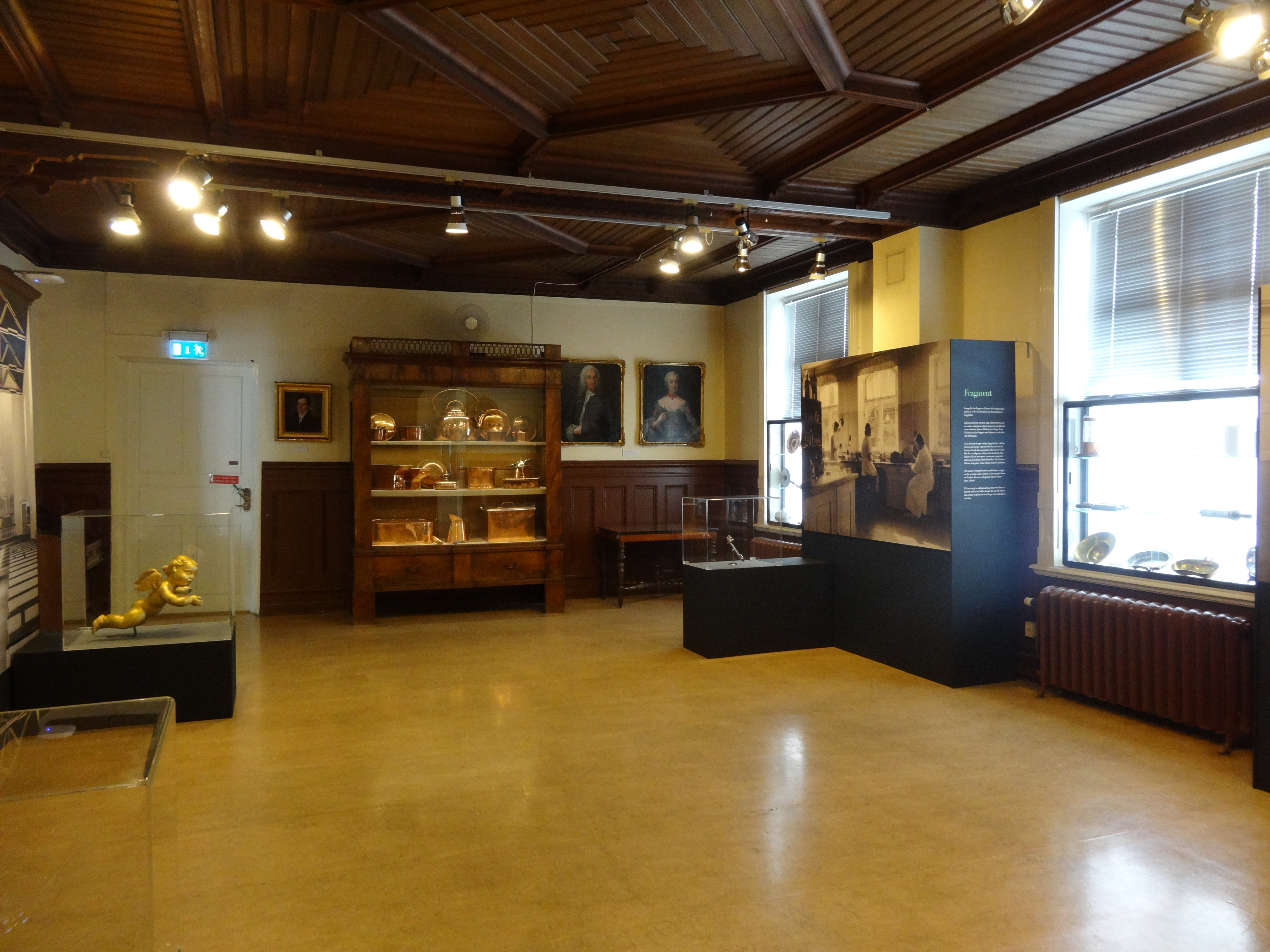 Del av basutställning på Medicinhistoriska museet i Göteborg.